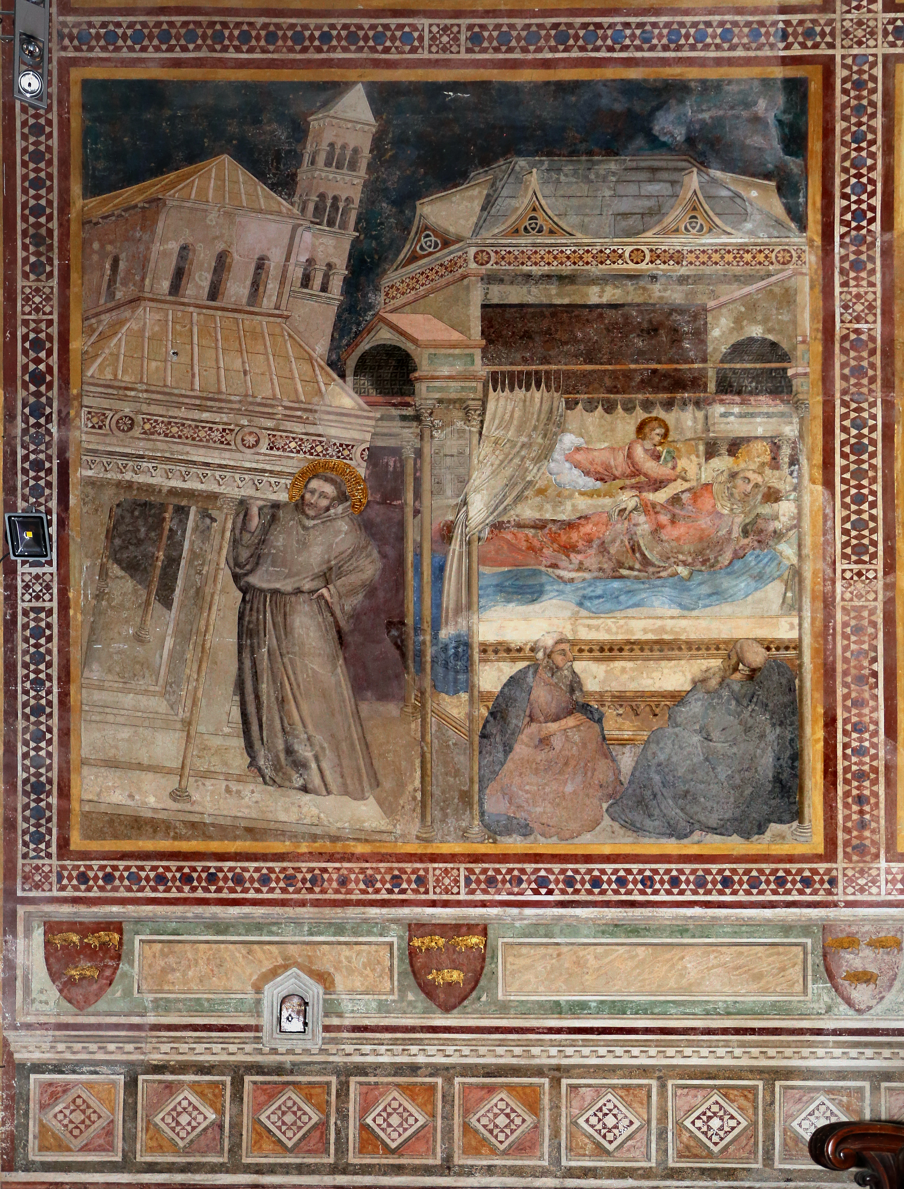 chiesa di San Francesco This is a photo of a monument which is part of cultural heritage of Italy.